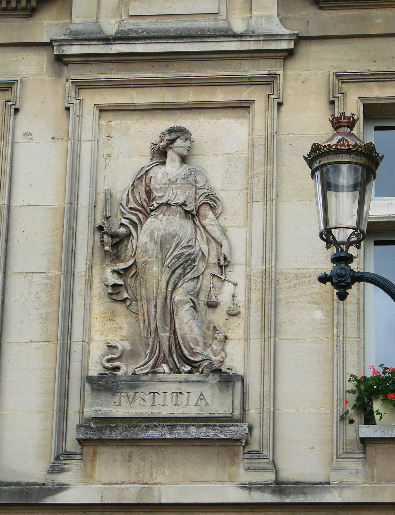 Bas-relief représentant la Justice sur la façade de l'Hôtel de Ville de Compiègne.